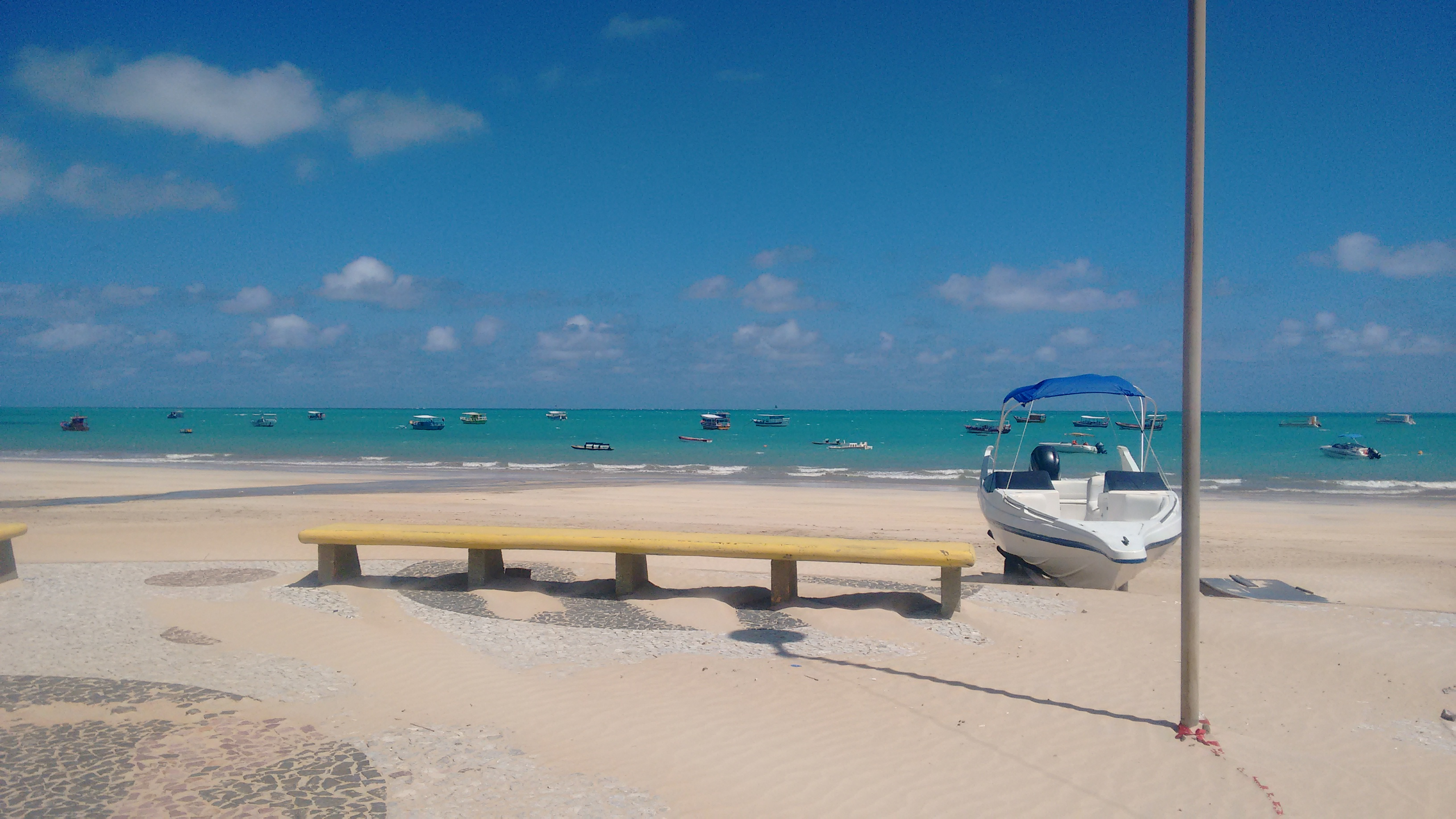 Praça no fim da orla de Margagogi